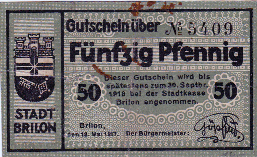 Brilon, Notgeld von 1918, 50 Pfennig.